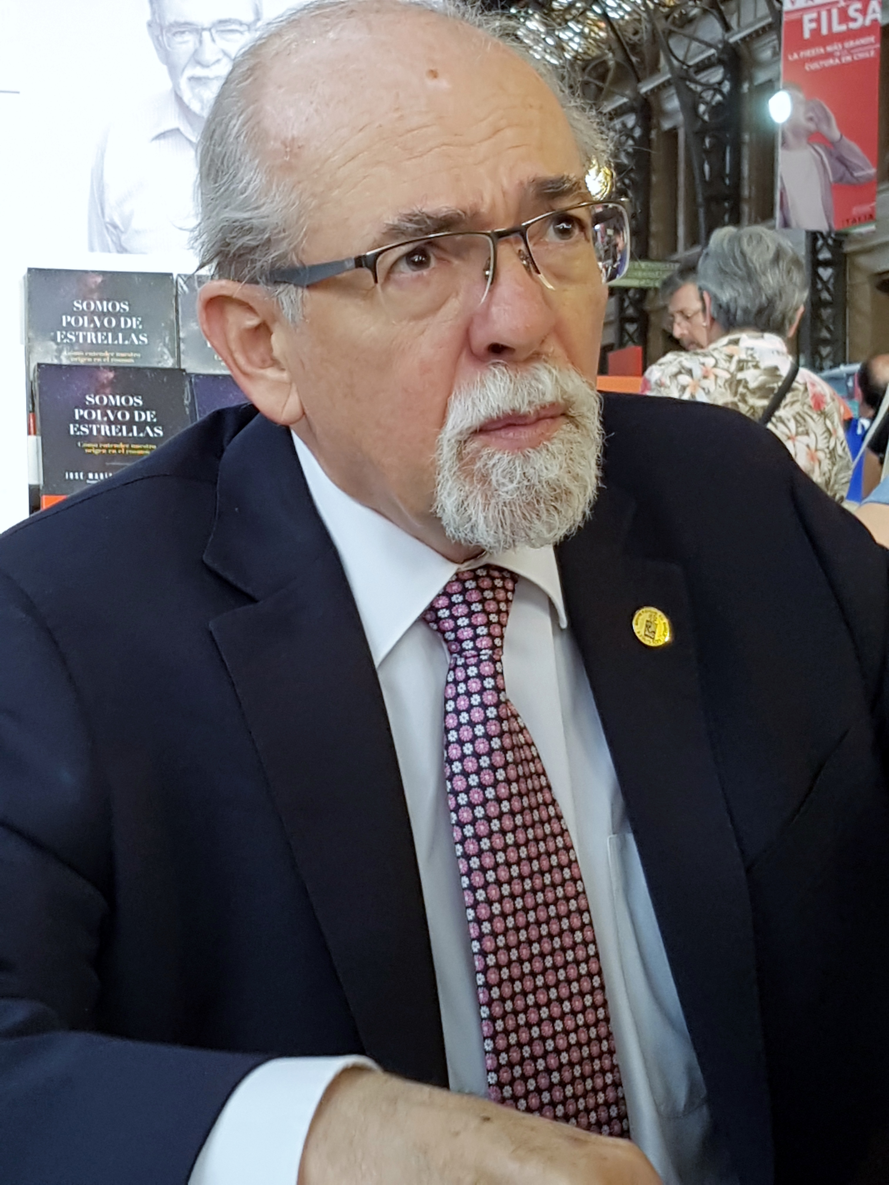 El astrofísico chileno José Maza en la Feria Internacional del Libro de Santiago 2017.